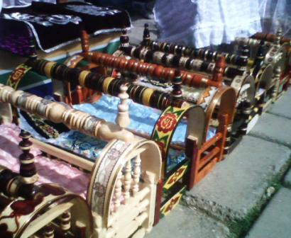 Гахвора - люлька для младенцев, Изделия ремесленников Истравшана, 2011Тоҷикӣ: Гаҳвора - бистари нарму ҷунбонест барои хобонидани тифли навзод. Гаҳвораҳои косибони Истравшан, 2011